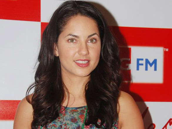 Barbara Mori promoting Kites at 92.7 Big FM